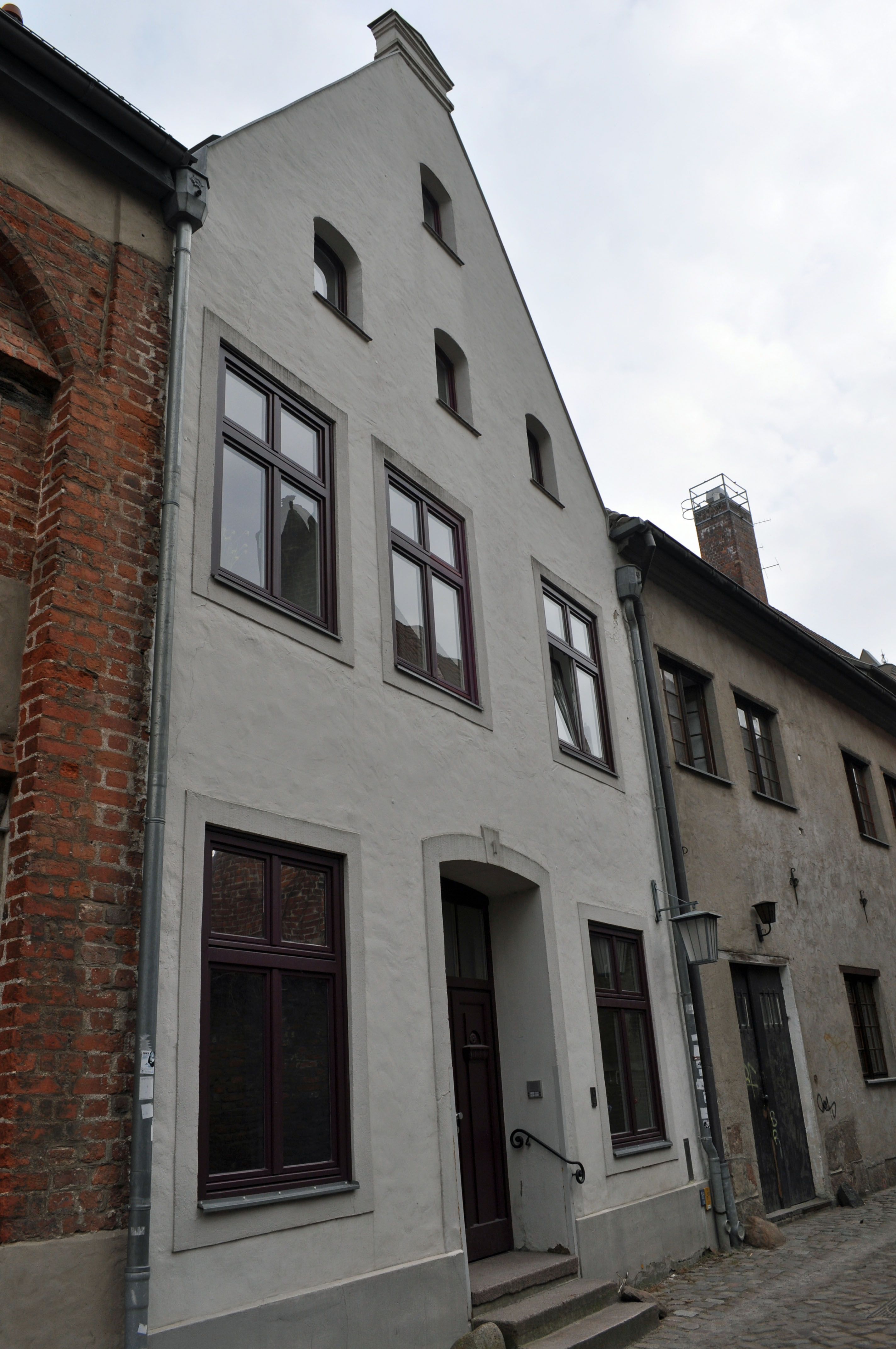 Gebäude bzw. Gebäudedetail in Stralsund. Straße und Hausnummer siehe Dateiname.